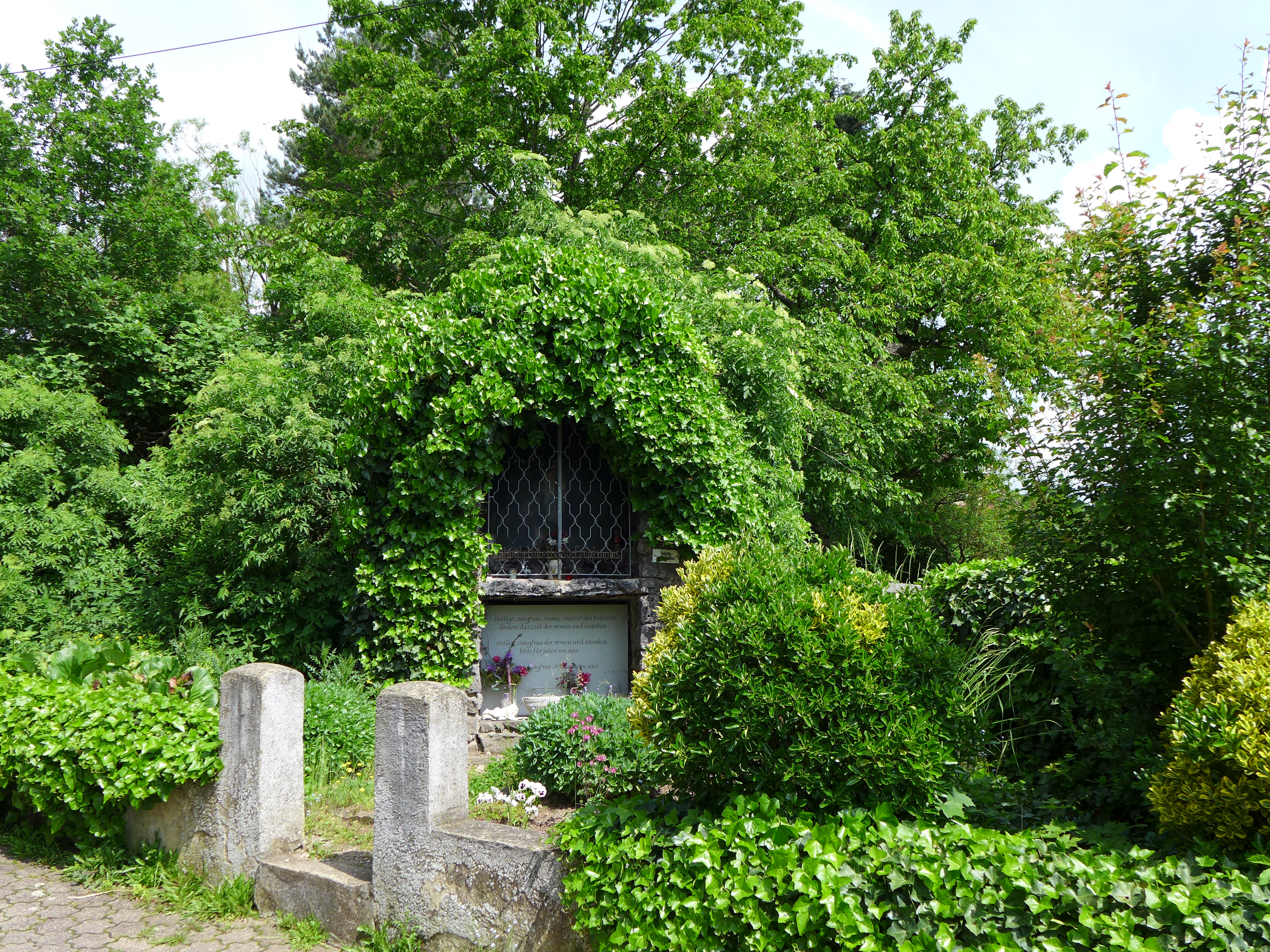 Diefflen, Lourdesgrotte